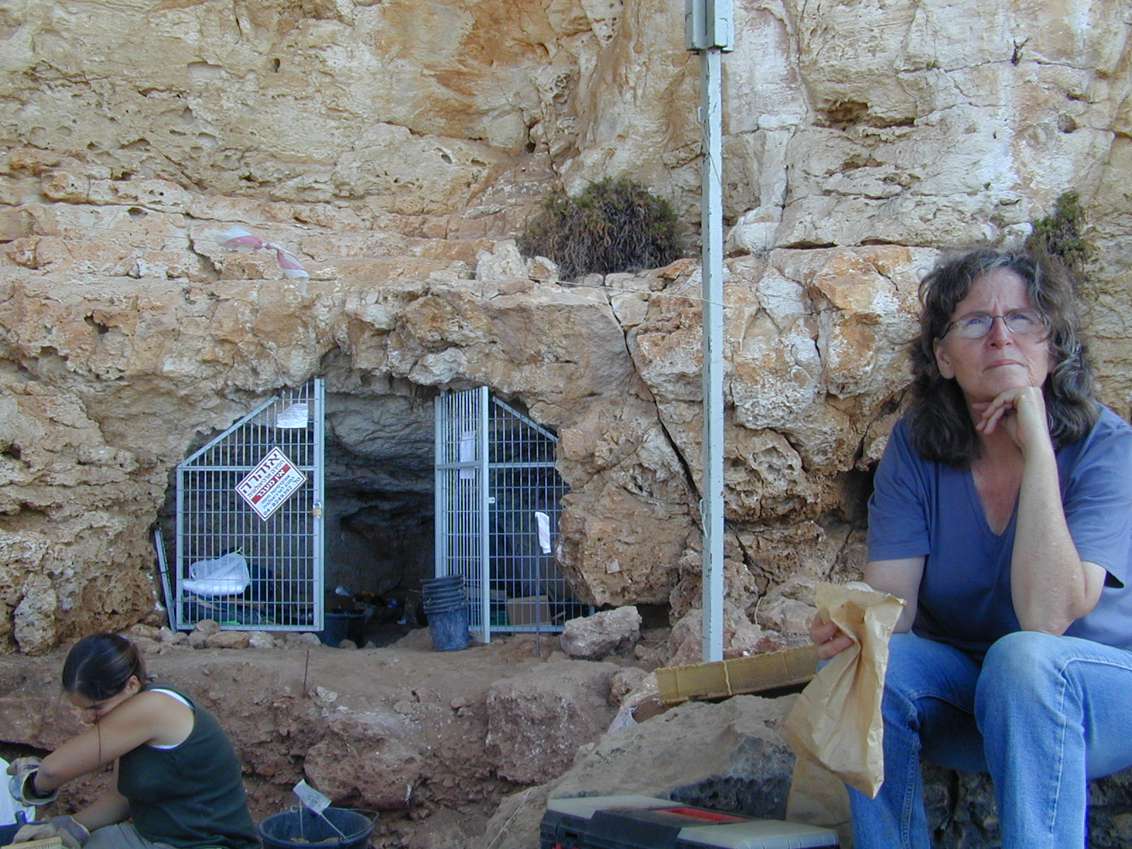 פרופ' מינה עברון במהלך חפירות באתר מערת מסילייה. הר הכרמל, Mina Evron